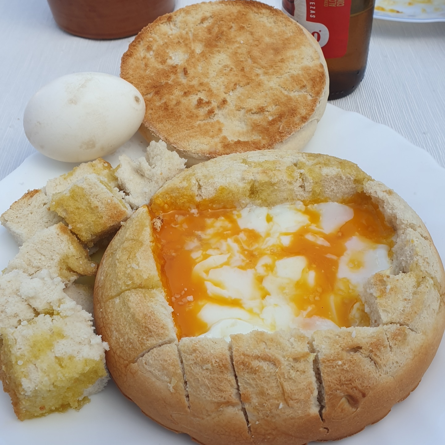 Plato típico de Villanueva del Ariscal.